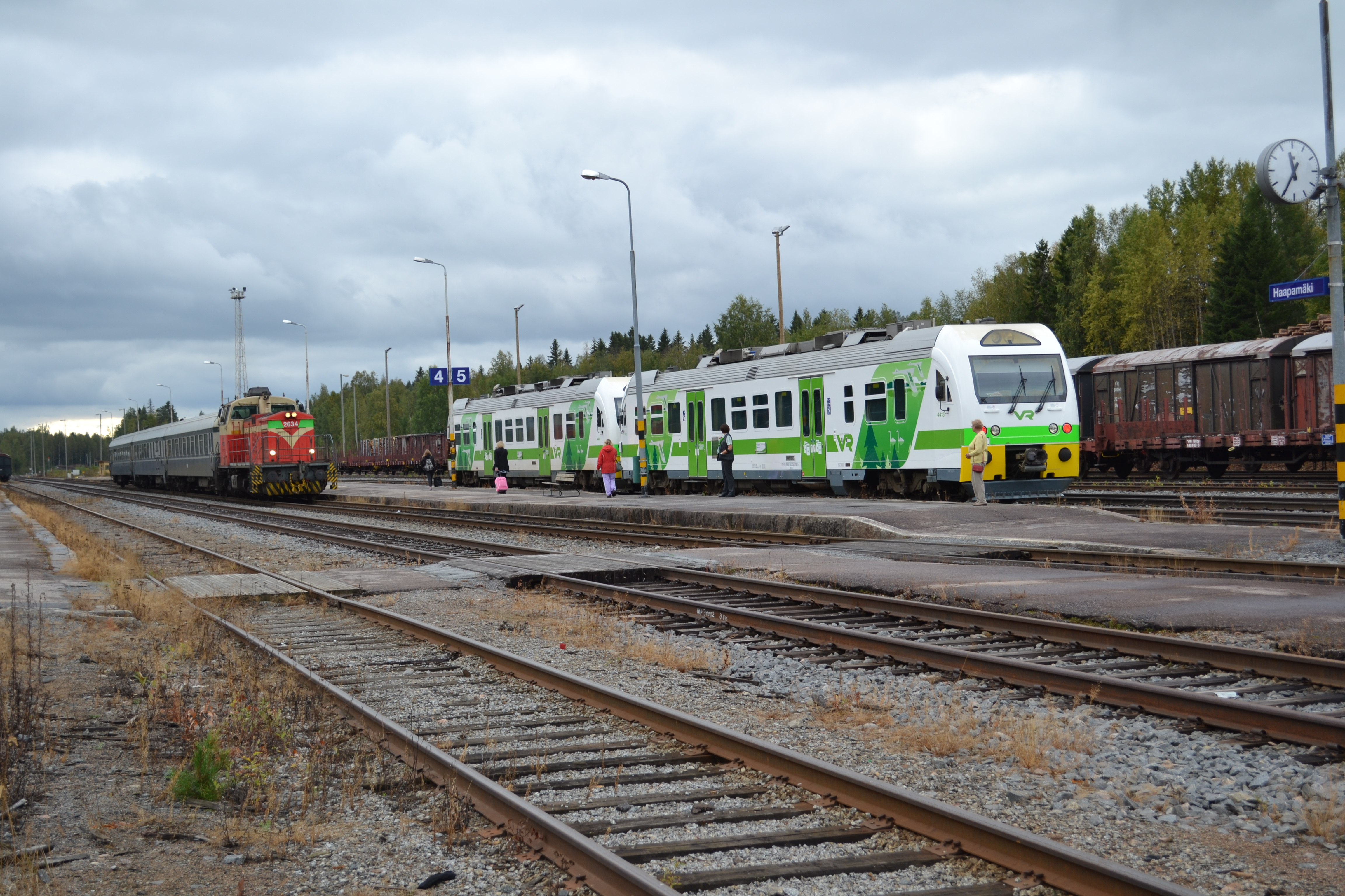 Kaksi taajamajunaa Haapamäen asemalla